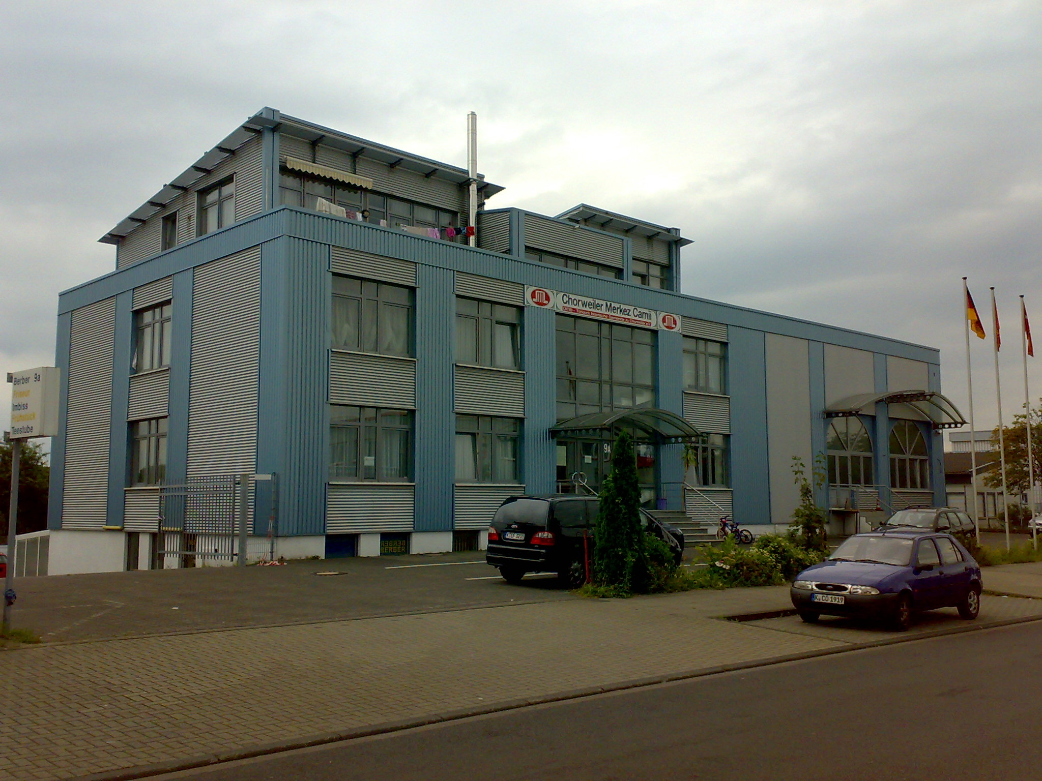 Außenansicht (Frontansicht)